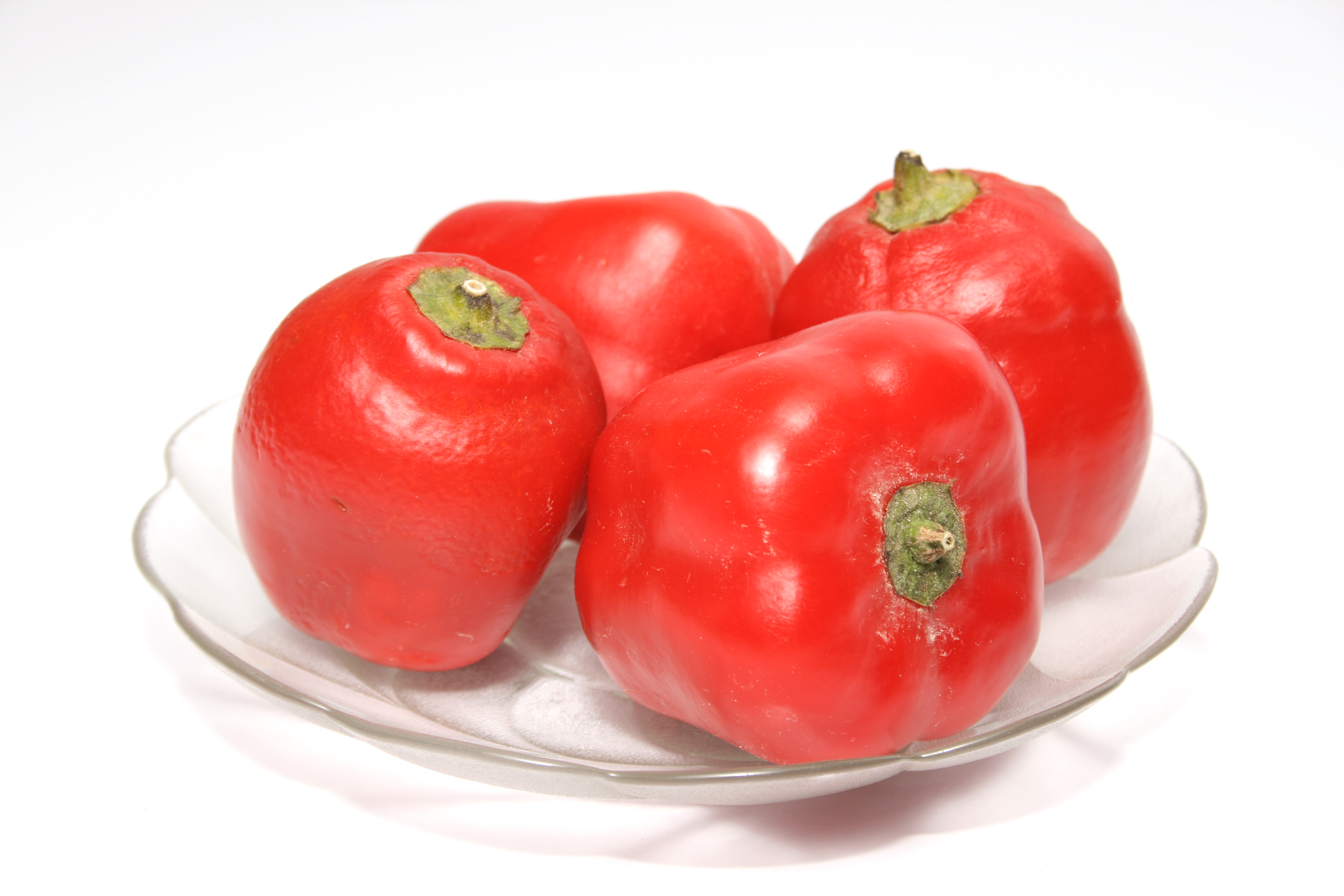 Rocoto Maduro